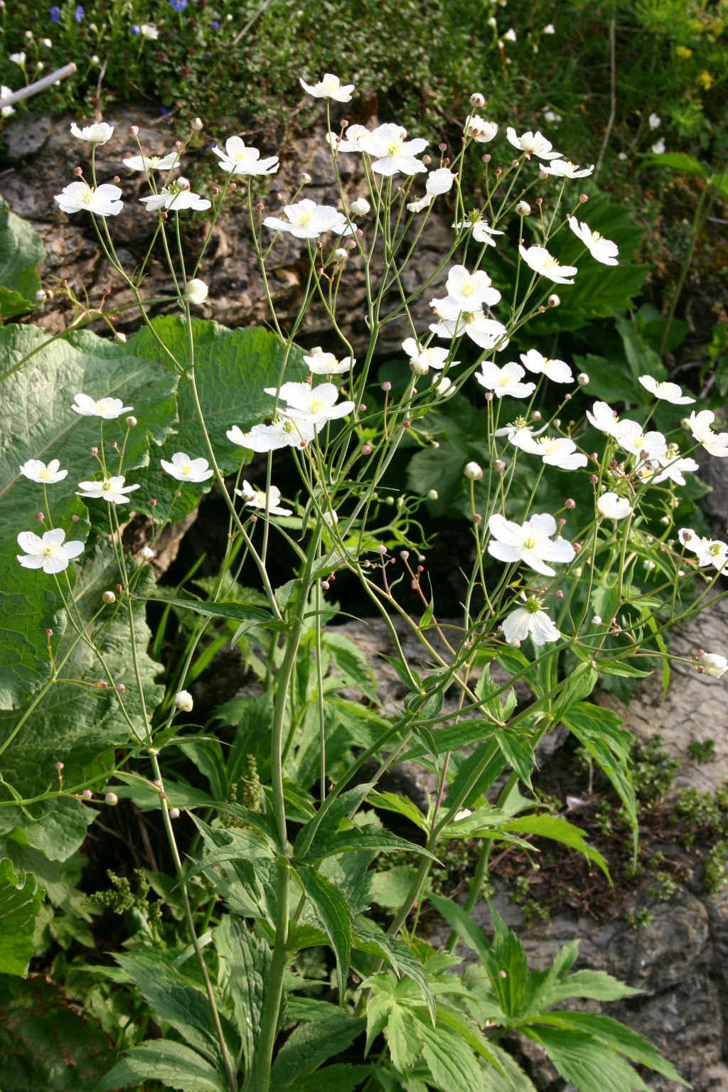 Platanen-Hahnenfuß (Ranunculus platanifolius) Aufnahmeort: Präbichl bei Eisenerz, Steiermark, Austria